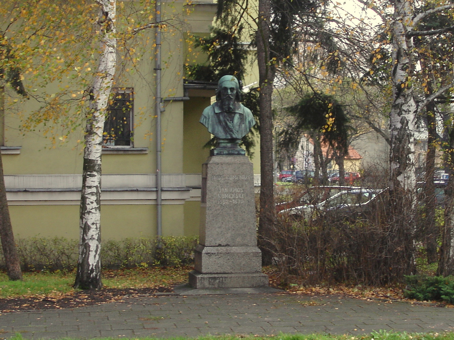 Pomnik Komeniusza w Lesznie na placu jego imieniem